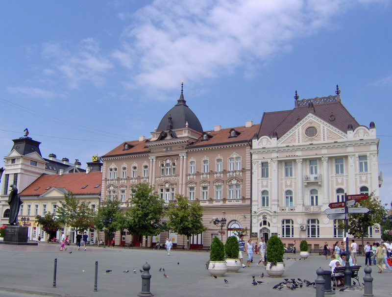 Блок зграда на Тргу Слободе - Trg Slobode in Novi Sad